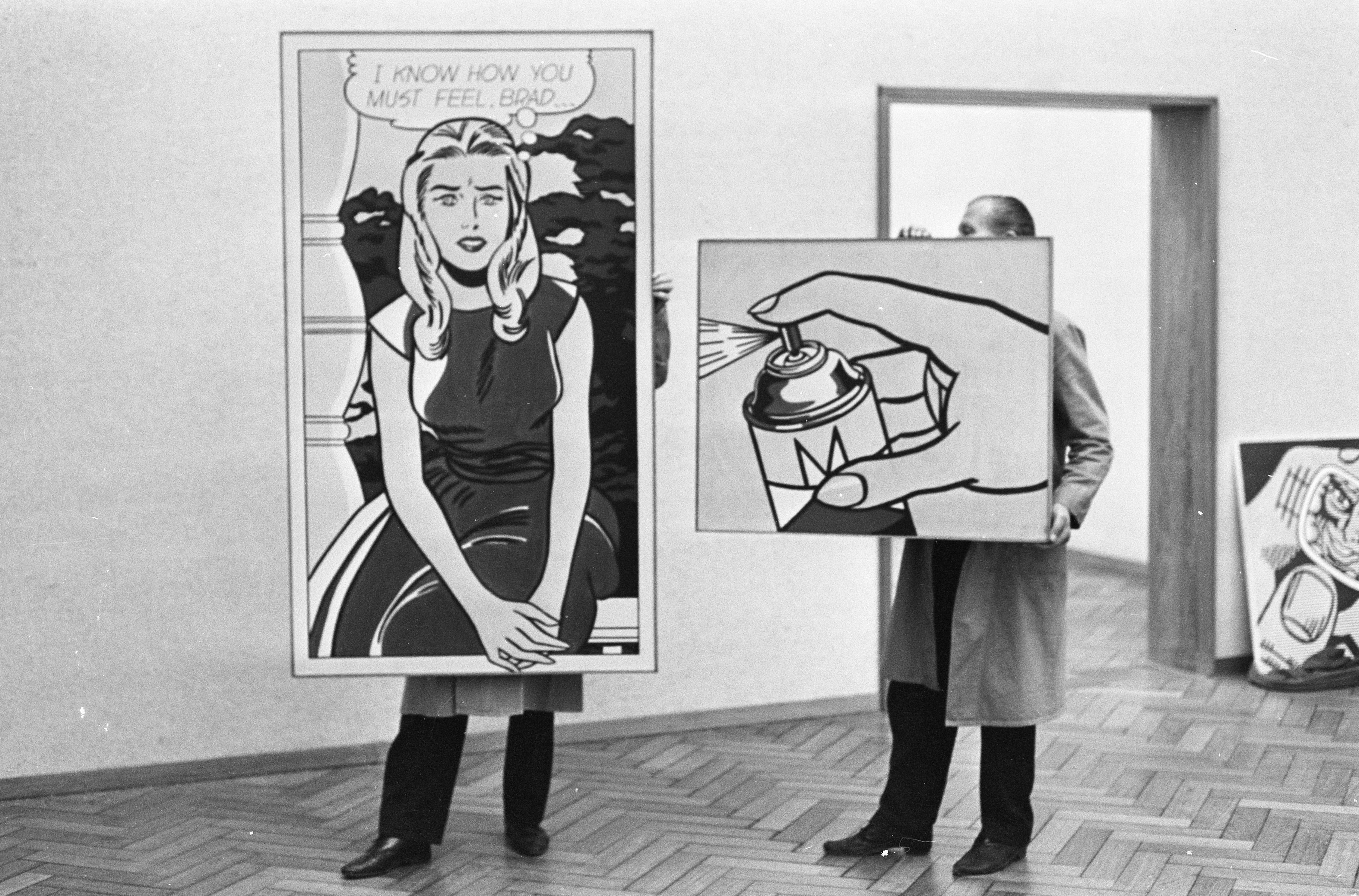 Collectie / Archief : Fotocollectie Anefo Reportage / Serie : [ onbekend ] Beschrijving : Tentoonstelling Roy Lichtenstein in Stedelijk Museum . Personeel aan het inrichten Datum : 1 november 1967 Trefwoorden : Musea, PERSONEEL, tentoonstellingen Fotograaf : Kroon, Ron / Anefo Auteursrechthebbende : Nationaal Archief Materiaalsoort : Negatief (zwart/wit) Nummer archiefinventaris : bekijk toegang 2.24.01.05 Bestanddeelnummer : 920-8281